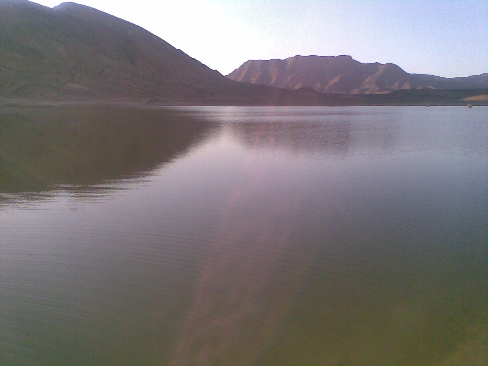 دریاچه سد انگبینه در 1390